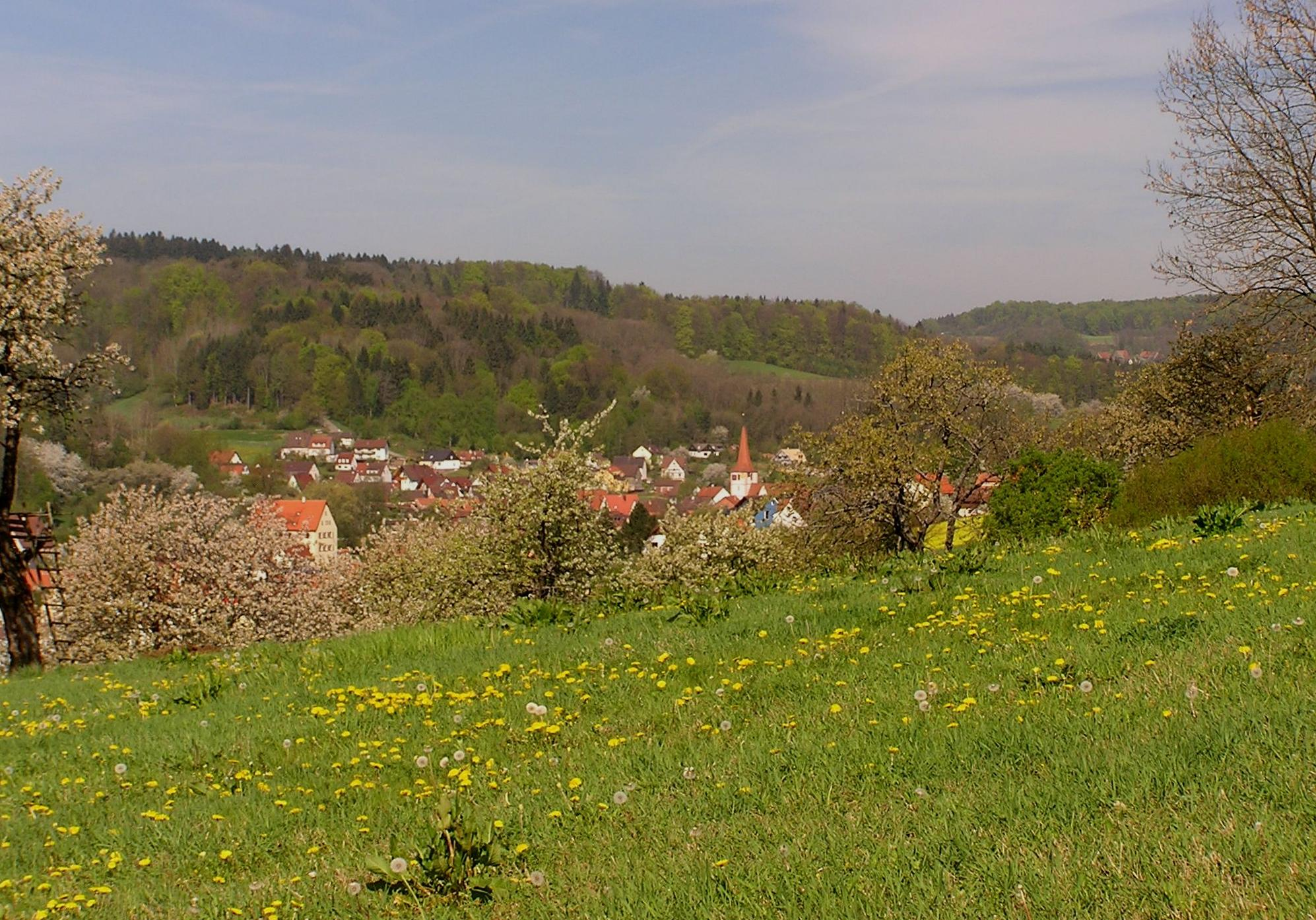 Kirchensittenbach (Mittelfranken)